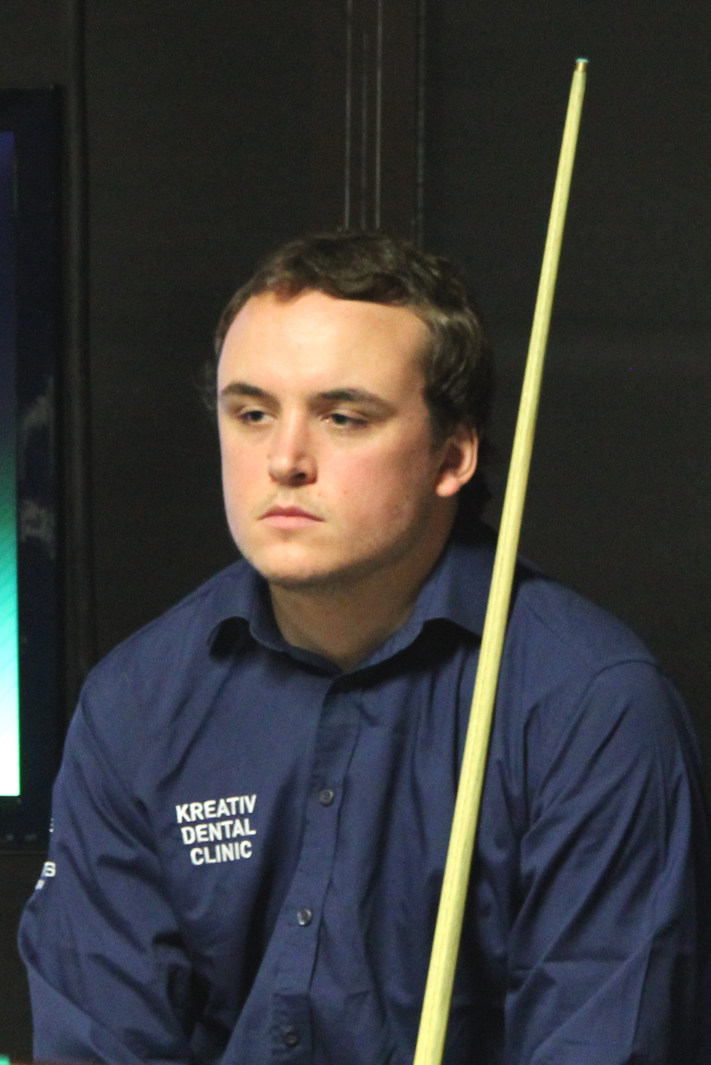 Sam Baird beim Paul Hunter Classic 2015